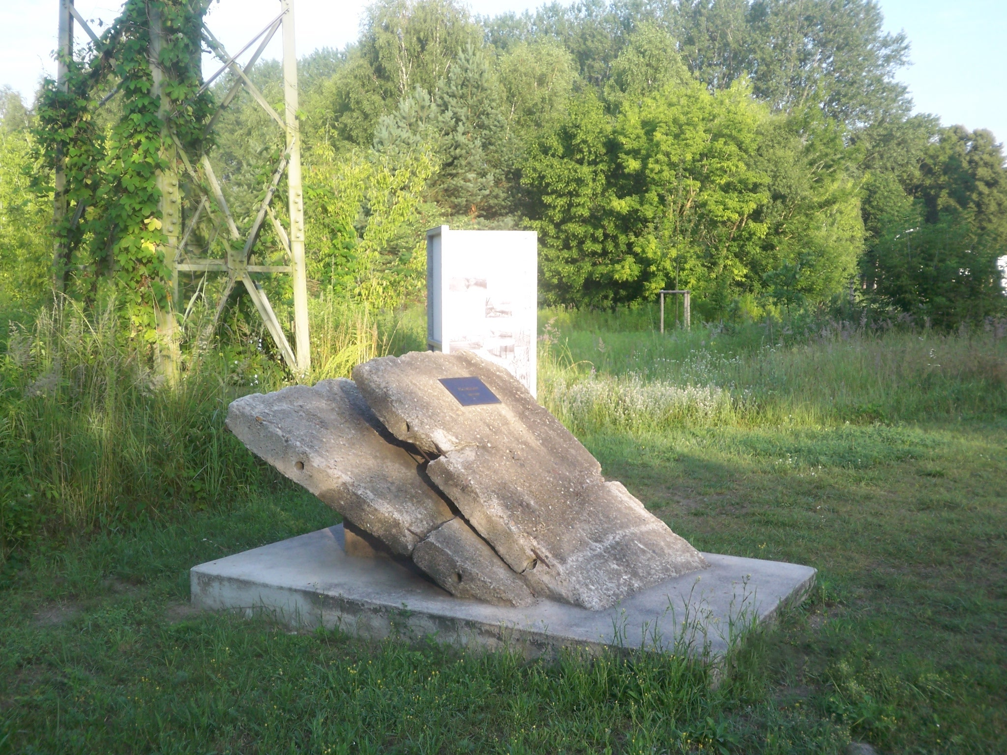 Mauerdenkmal in Schönwalde-Glien an der Steinernen Brücke, Grenze zu Spandau